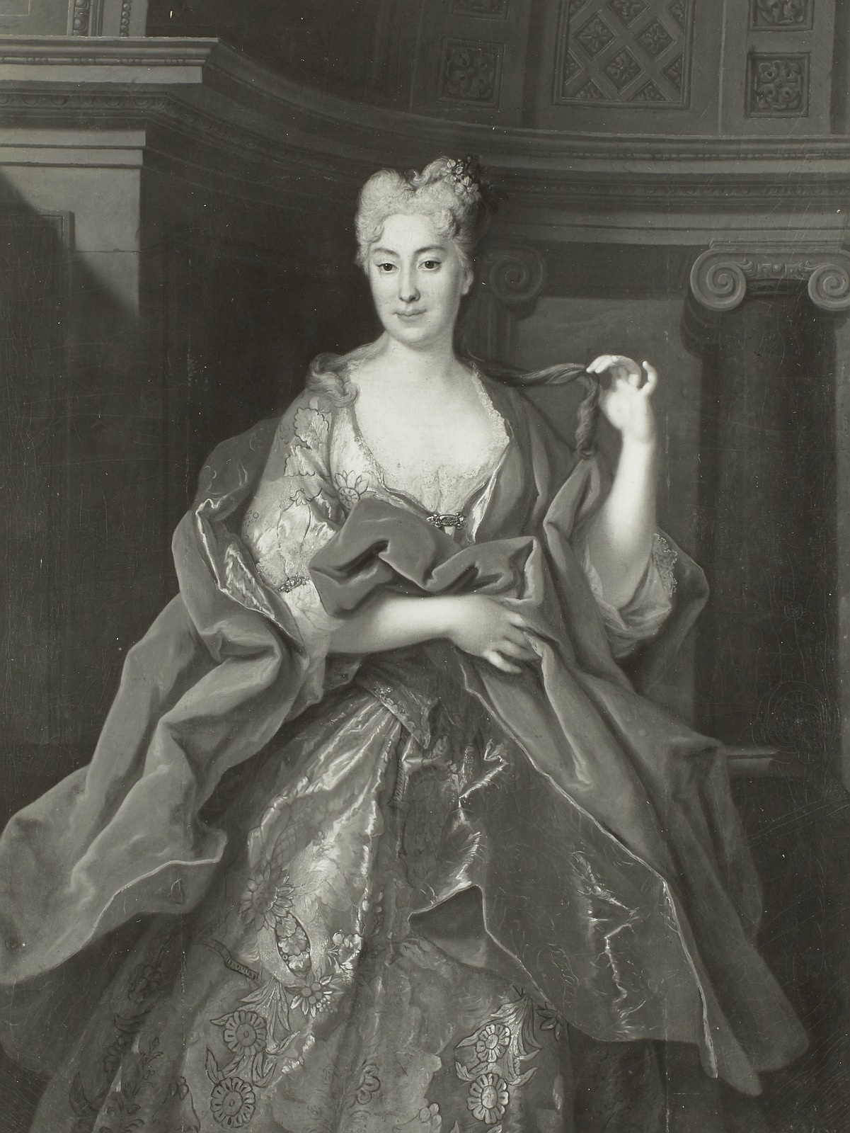 Беларуская (тарашкевіца): Партрэт Тэрэзы Агінскай (Tereza Aginskaja)